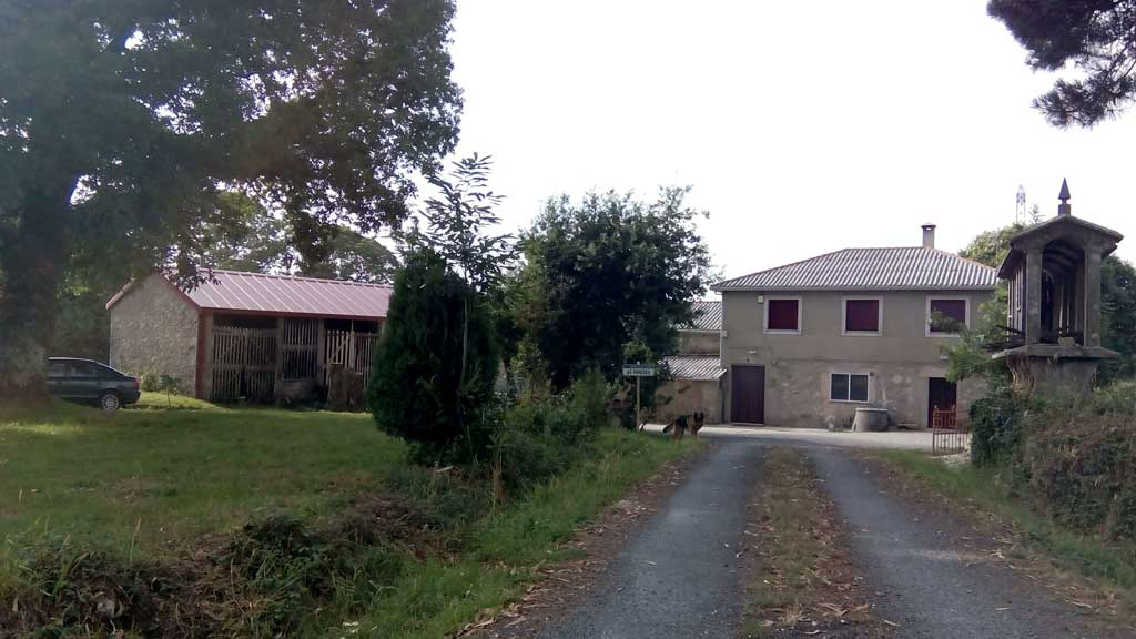 Vista das Paredes, Curtis.